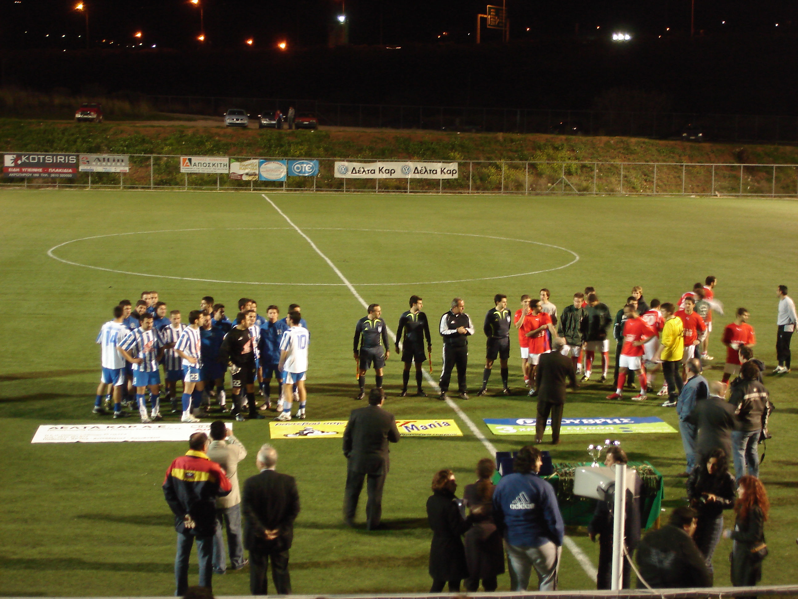 Achaea amateur football cup 2007-08 Κύπελλο ερασιτεχνών Αχαΐας 2007-08, Πριν την απονομή των κυπέλλων και μεταλλίων